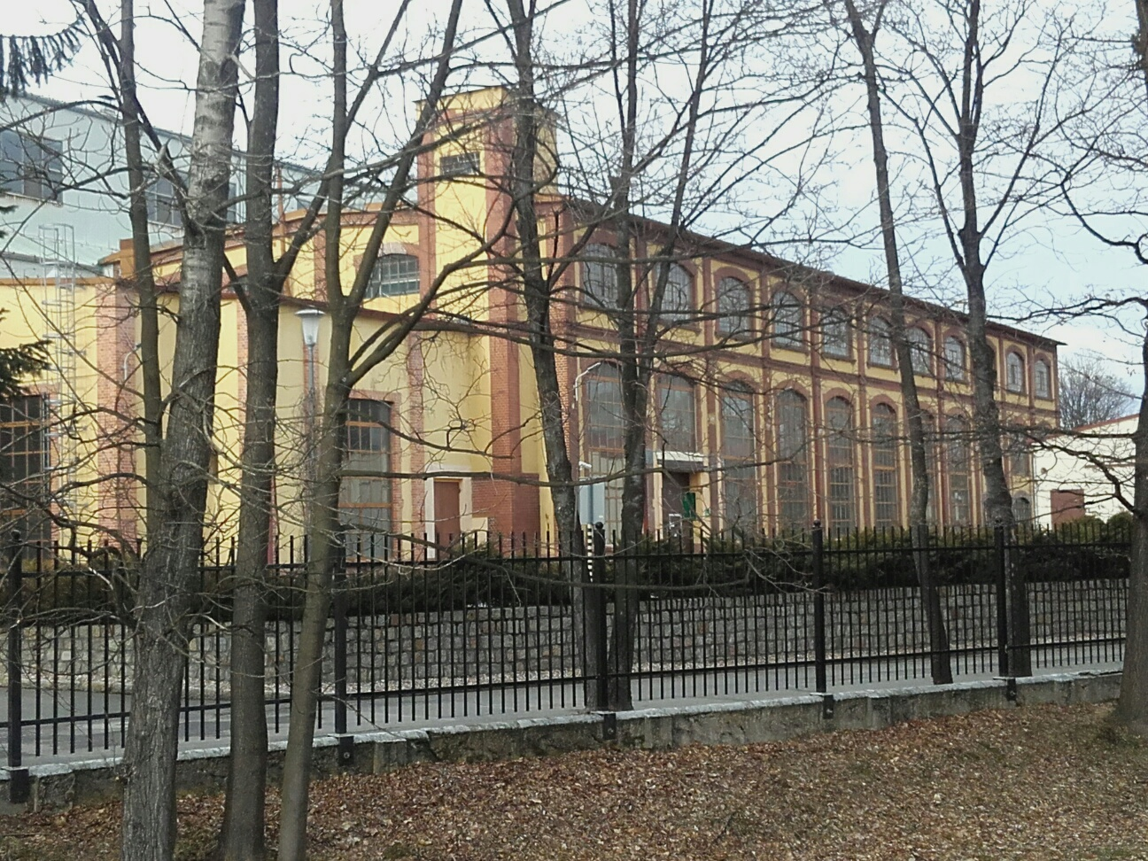 PMP group polska